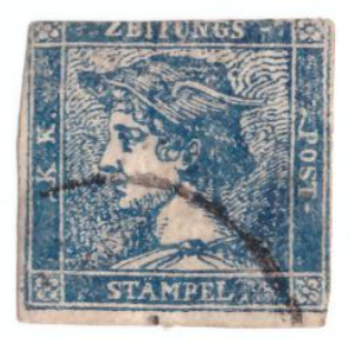 Ukázka poštovní známky Merkur